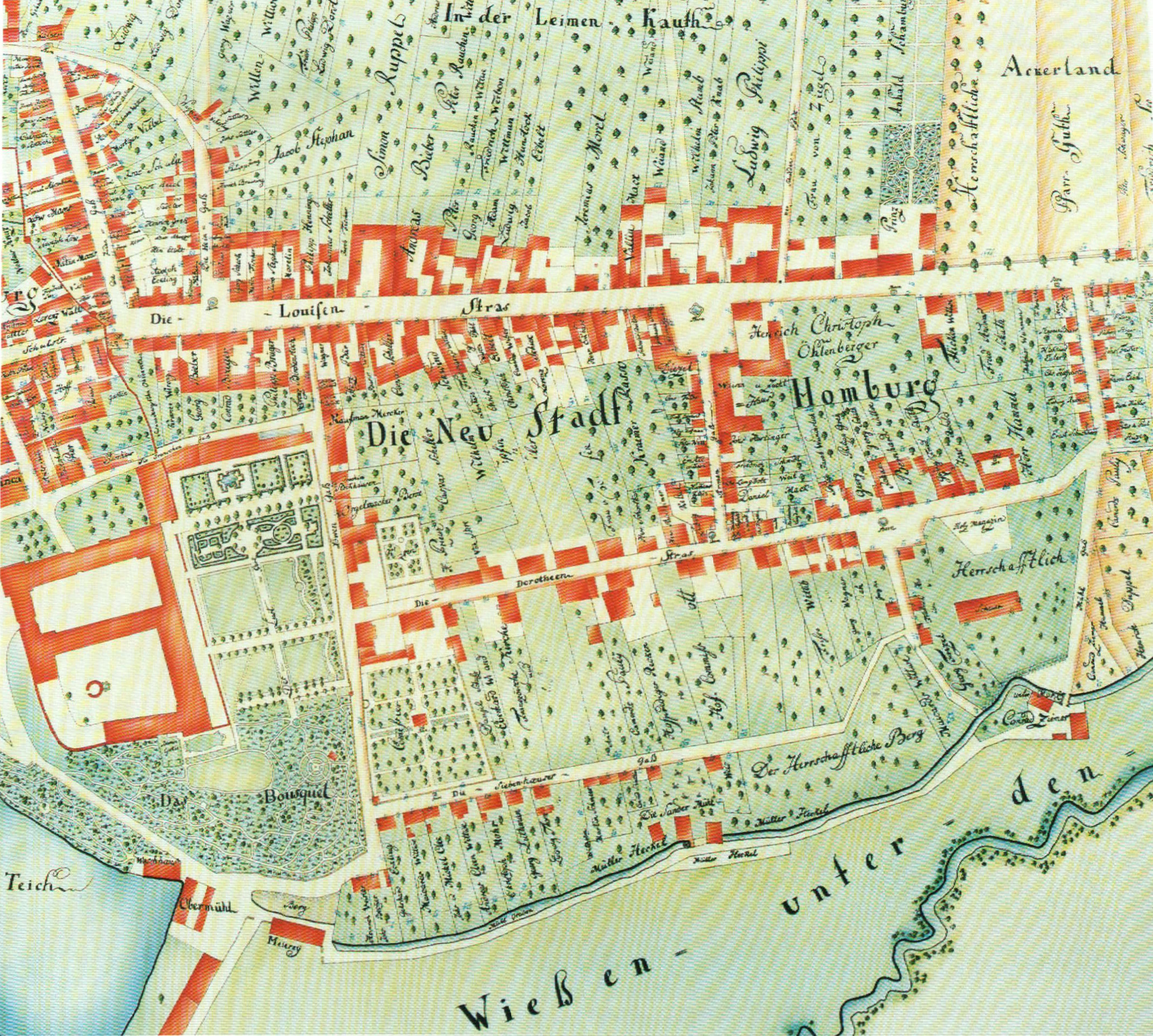 Bad Homburg, Bruchscher Stadtplan von 1787